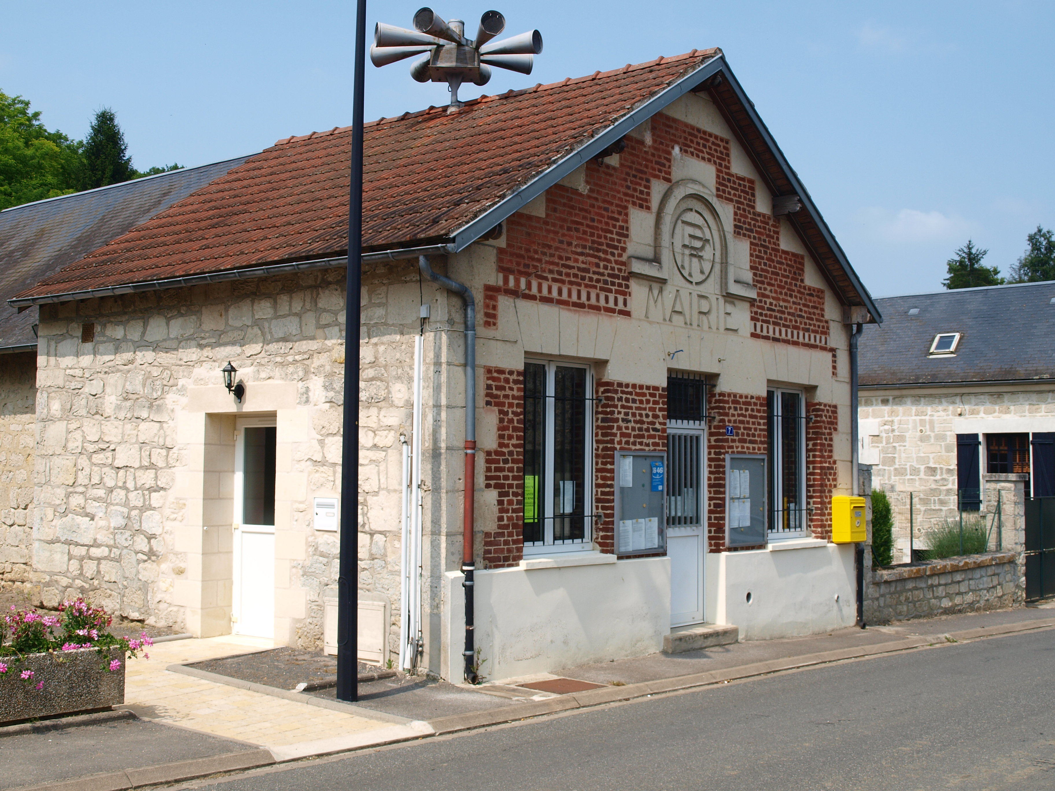 Vuillery (Aisne, France) ; mairie